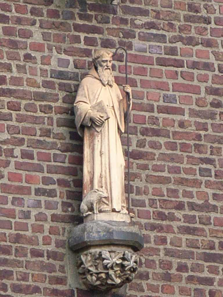 Summary Bildbeschreibung: Antoniusfigur mit Schwein an der Kapelle in Tenholt Quelle: eigenes Foto Fotograf/Zeichner: bodoklecksel 15:11, 15. Jun 2006 (CEST) Datum: Juni 2006 Sonstiges